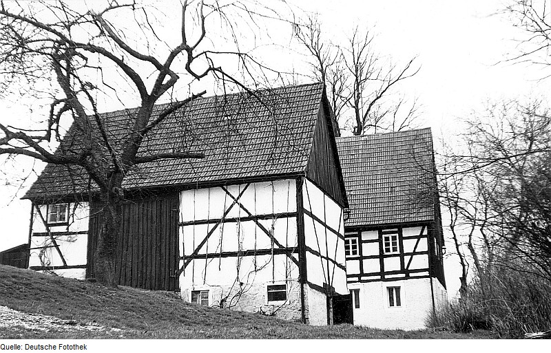 Original image description from the Deutsche Fotothek Reinsberg-Steinbach. Kriegermühle